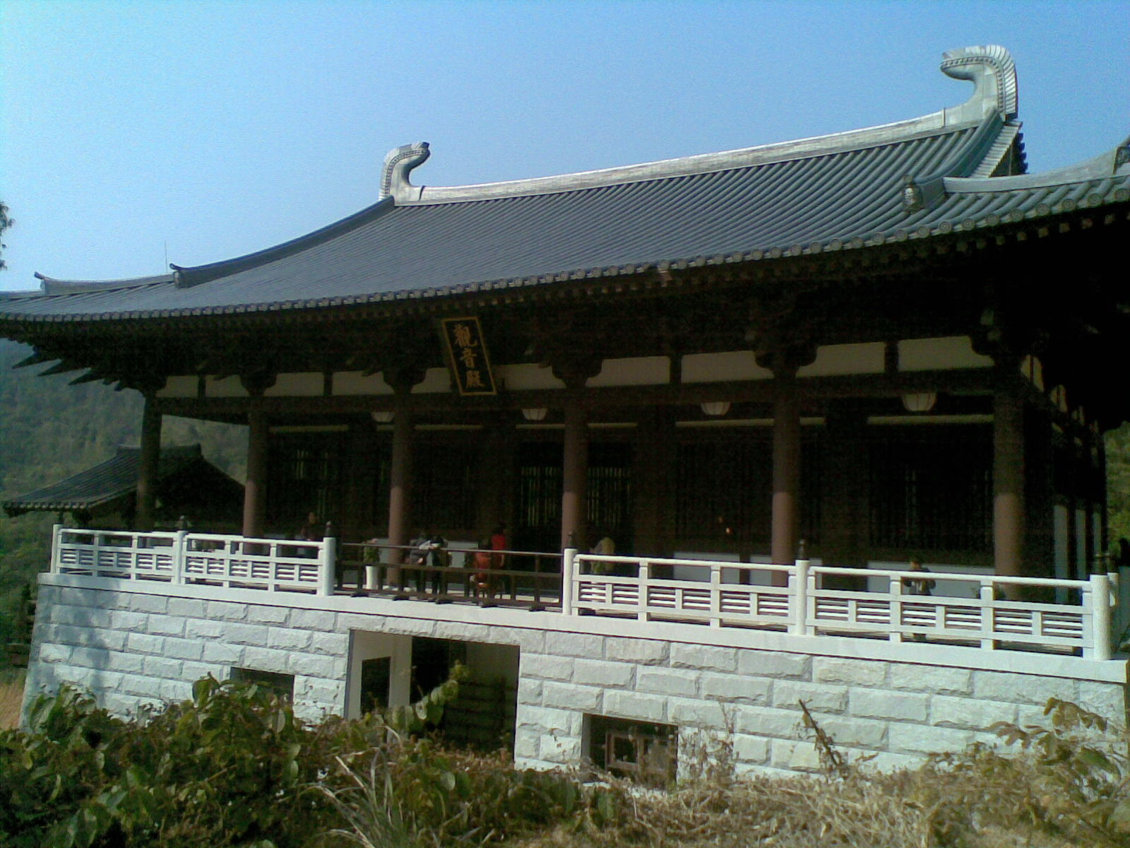 柏塘平安山观音殿